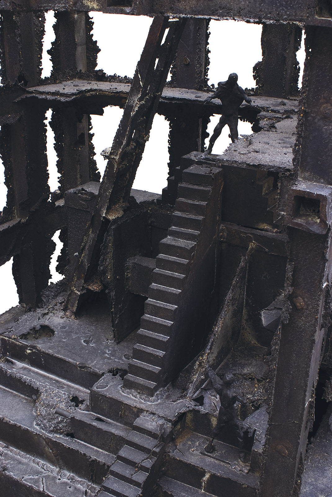 Jiří Sozanský, Skelet (detail), bronz, 2008